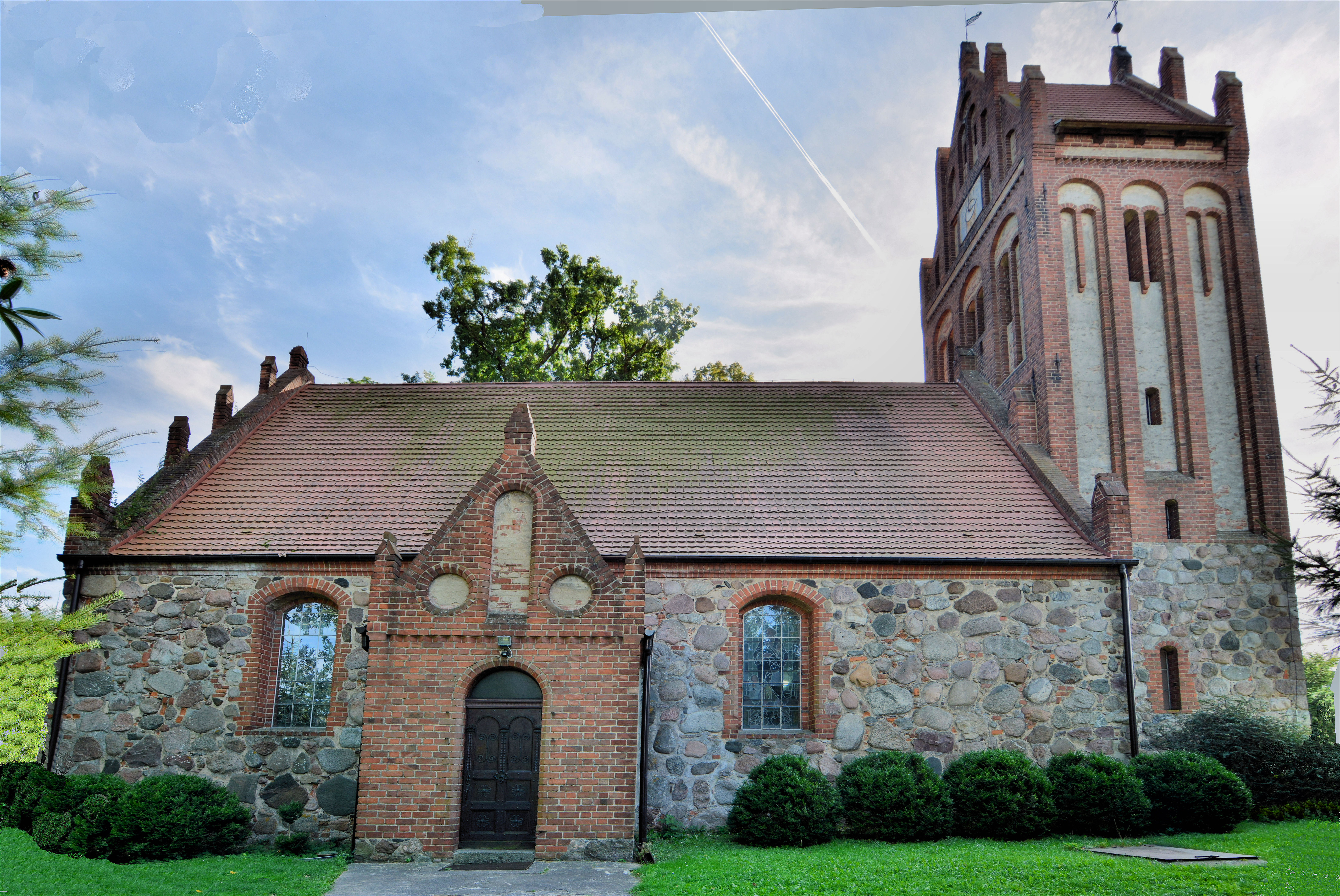 Pęzino, kościół par. p.w. Wniebowzięcia NMP, kon. XVI